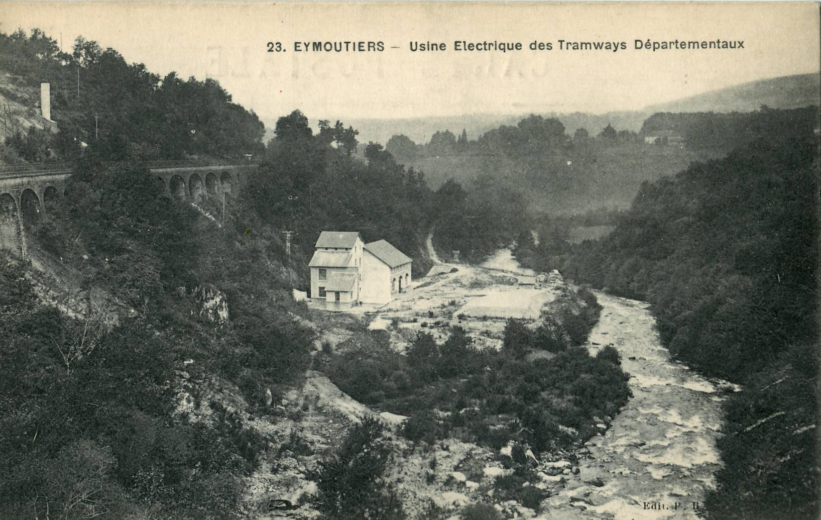 Carte postale ancienne, avec une mention d'éditeur illisible en bas à droite, n°23 :EYMOUTIERS - Usine électrique des Tramways départementaux